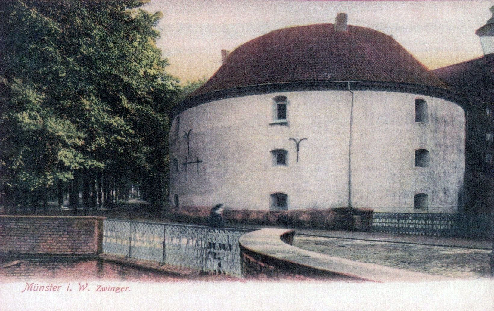 Der Zwinger in Münster (Westfalen) um 1900